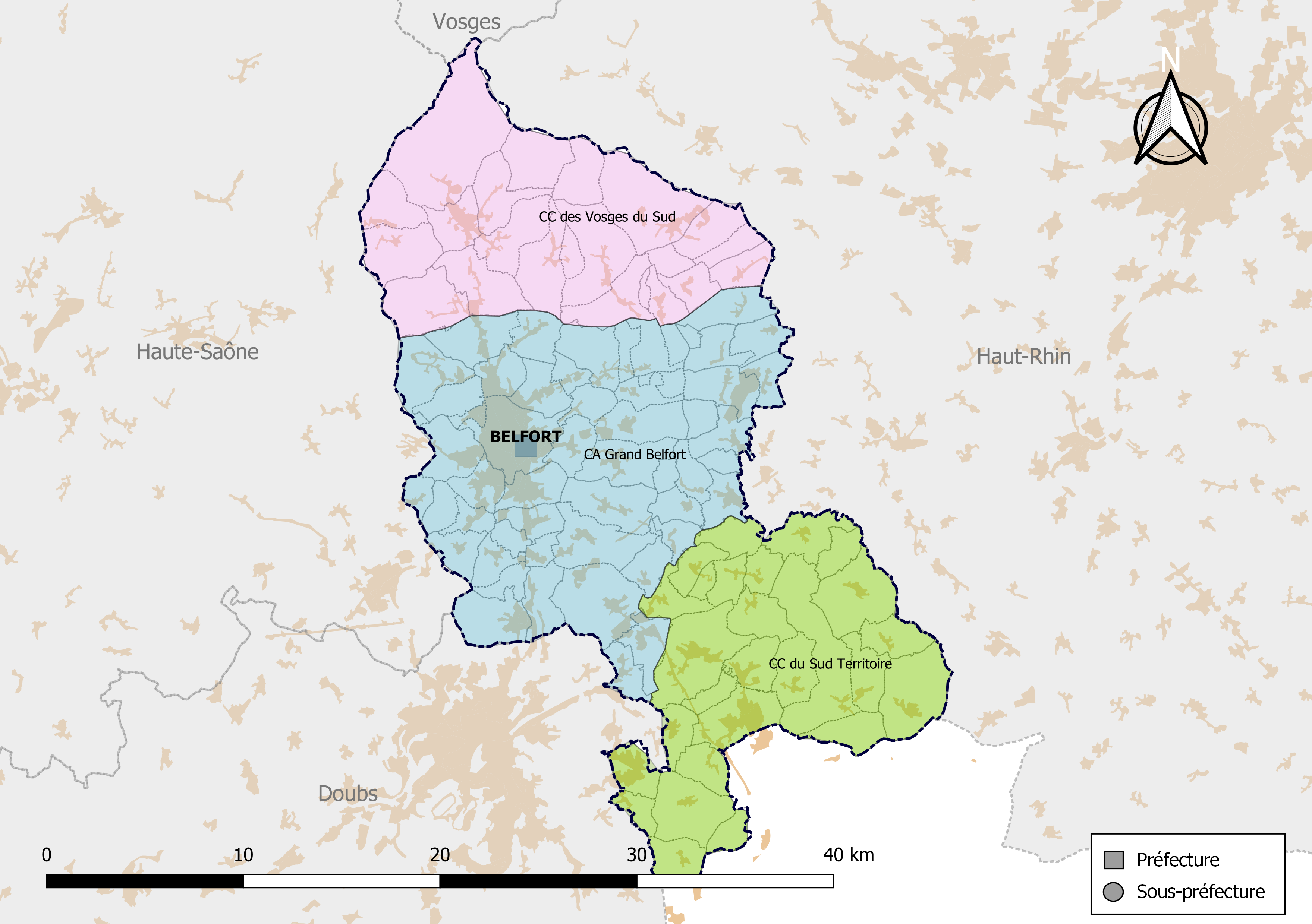 Carte des intercommunalités du département du Territoire de Belfort, France. Composition au 1er janvier 2019.